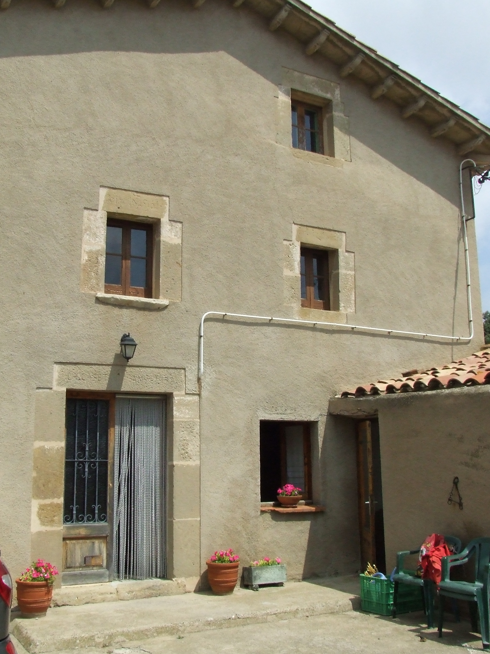 La Caseta del Giol (Castellcir, Moianès)